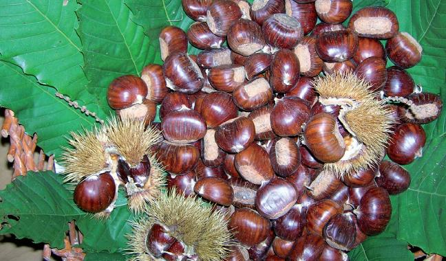 Marrone_SanZeno